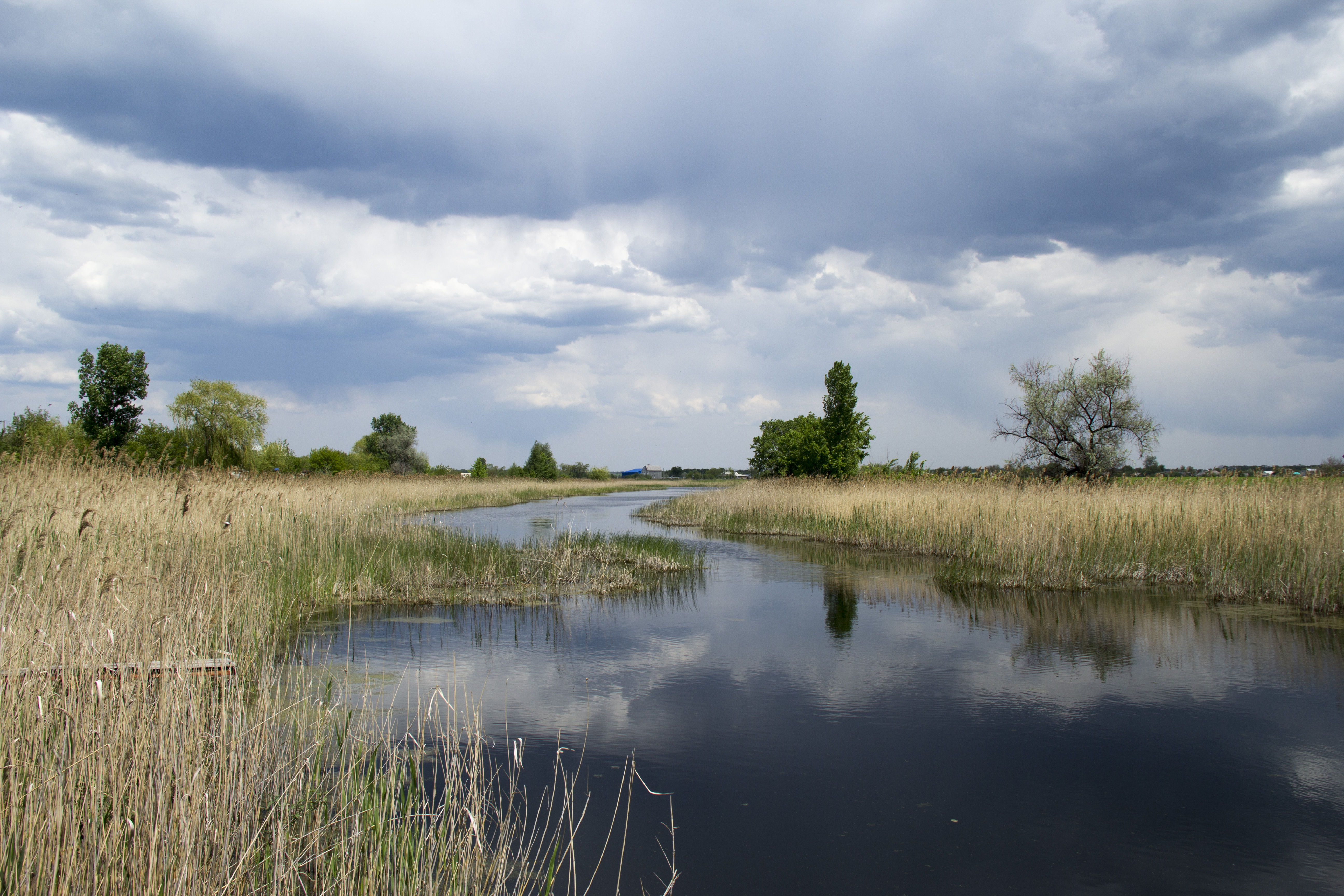 Кільченський, Дніпропетровський р-н, м. Підгородне